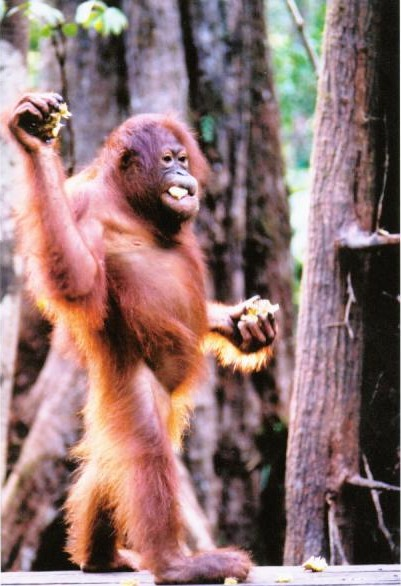 Taken from Wikipedia. Same name. "Orangutan image taken by Tom Low at Camp Leakey, Tanjung Puting, Kalimantan, Indonesia (2003)."